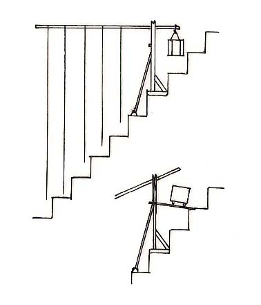 Système préconisé par Croon l'édification d'une pyramide à degrés